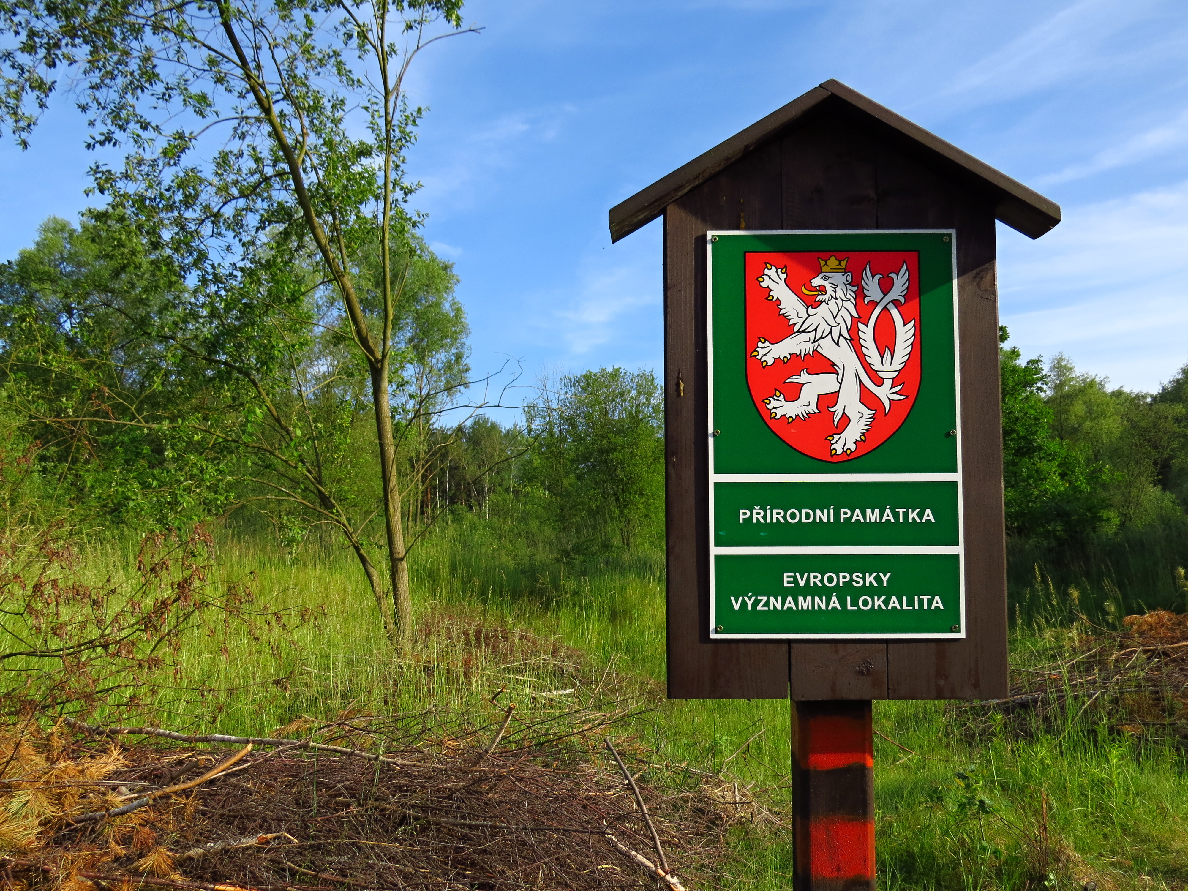 PP Na Plachtě 3